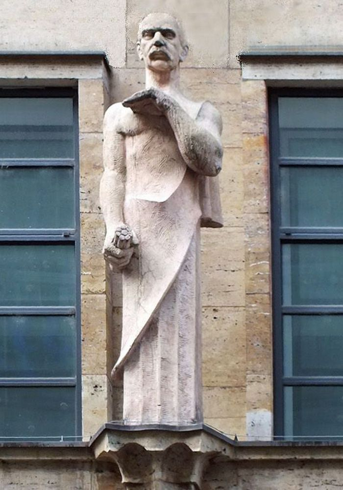 Oberbürgermeister Karl Rothe als Balustradenfigur am Leipziger Petershof